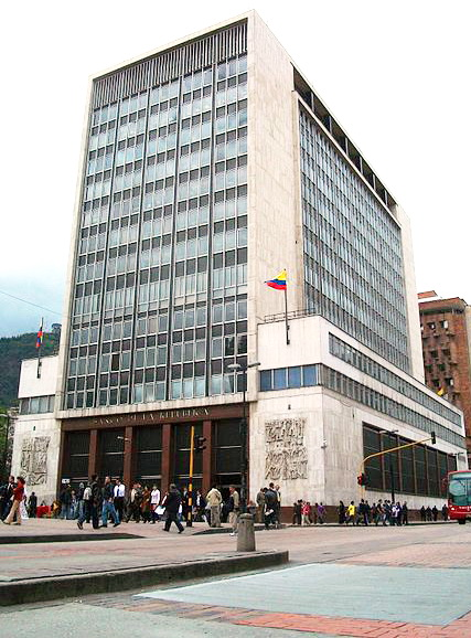 Edificio del Banco de la República en Bogotá, en el Eje Ambiental con la carrera Séptima